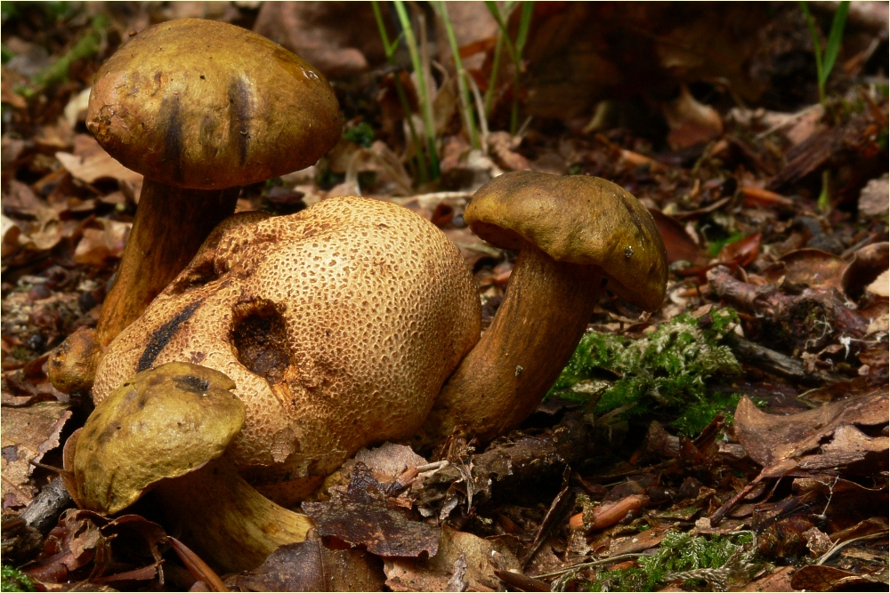 Parasitischer Röhrling (Pseudoboletus parasiticus), Urwald Sababurg